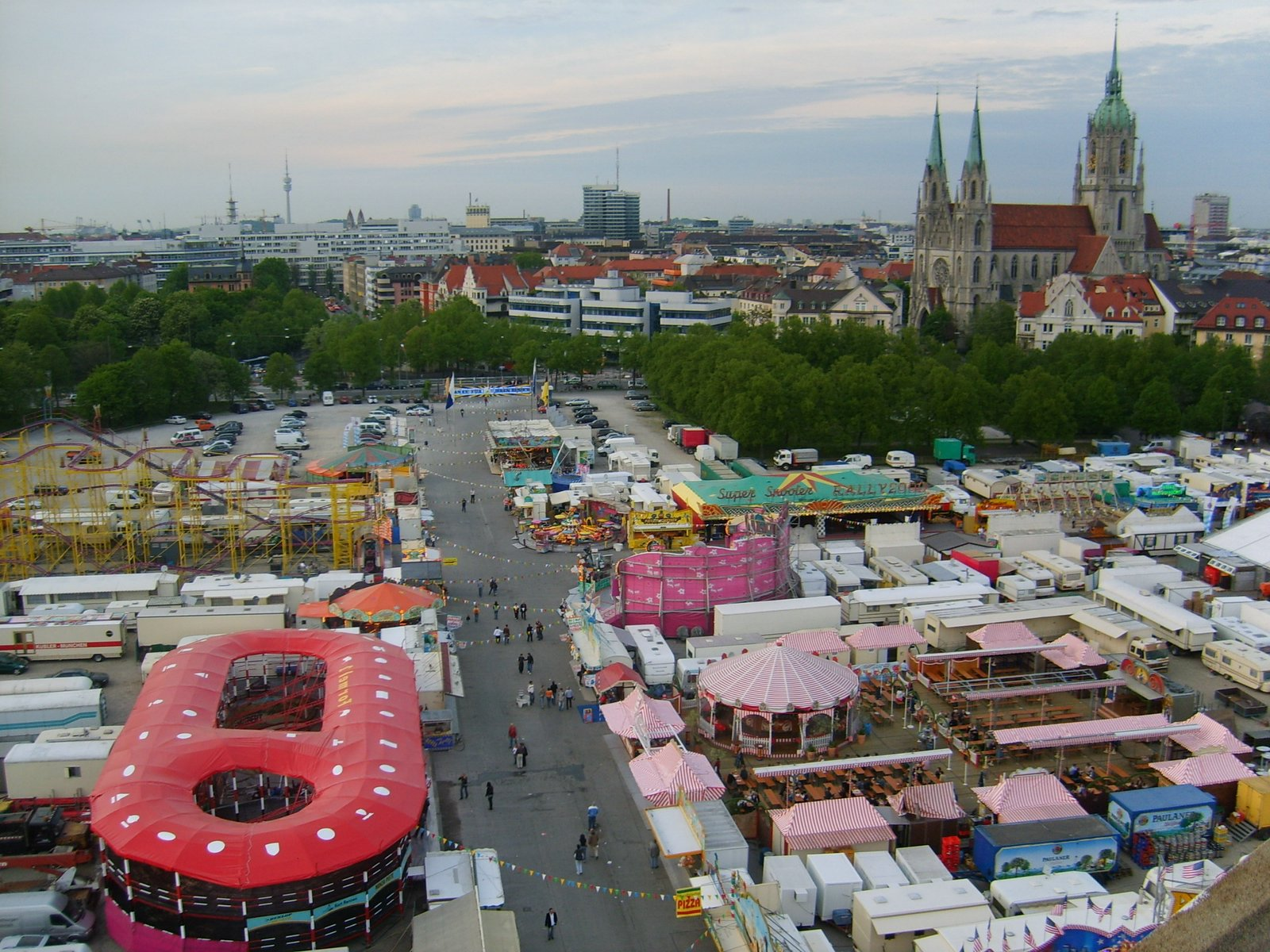 Theresienwiesen